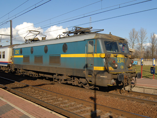 Locomotief 2343 rijdt met een personentrein door het station Antwerpen-Noorderdokken